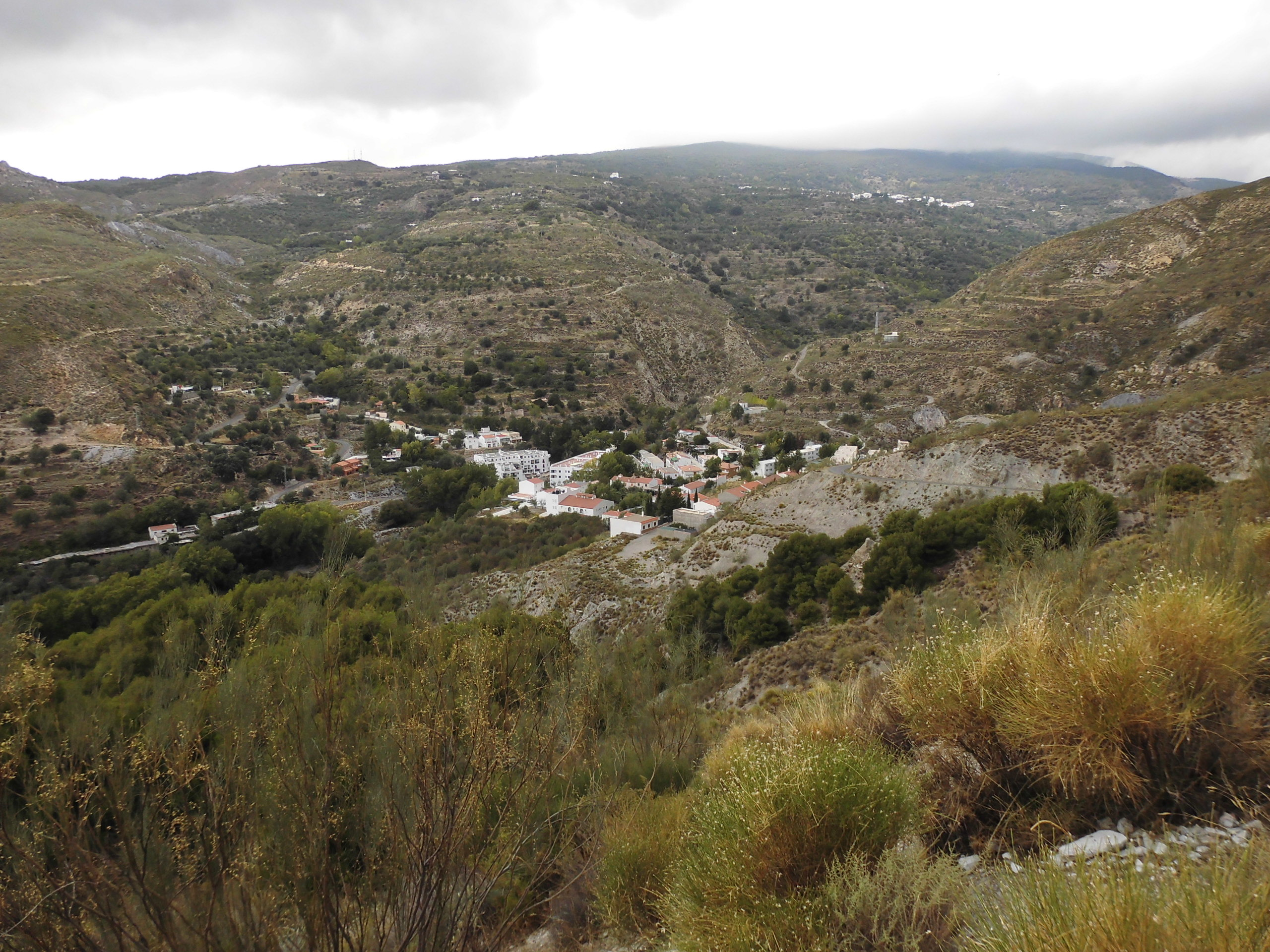 Fotografía de Baños de Santiago, pedanía de Paterna del Río (al fondo), provincia de Almería, Andalucía, España, desde el lado sur.